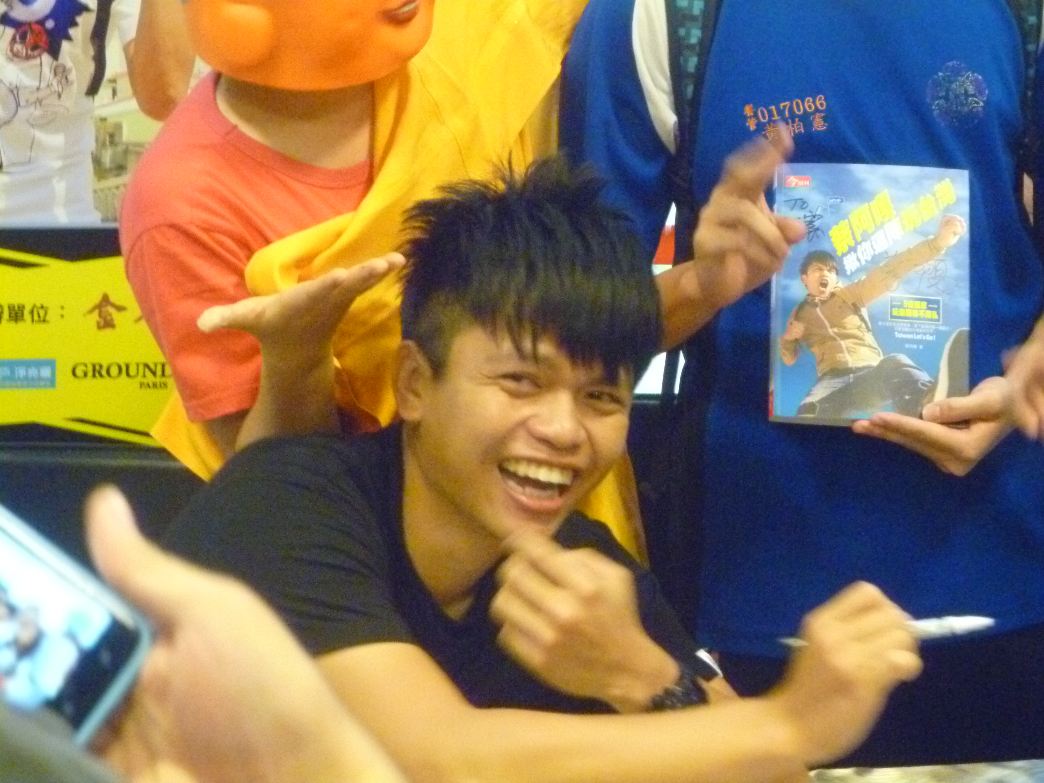 中文（台灣）: 蔡阿嘎在台南新光三越《蔡阿嘎揪你逗陣玩台灣:9條獨家玩樂路線不藏私》(今周刊出版)簽書會